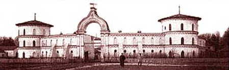 Місто Тростянець Сумської області - Круглий двір: Центральний вхід до «Круглого столу»